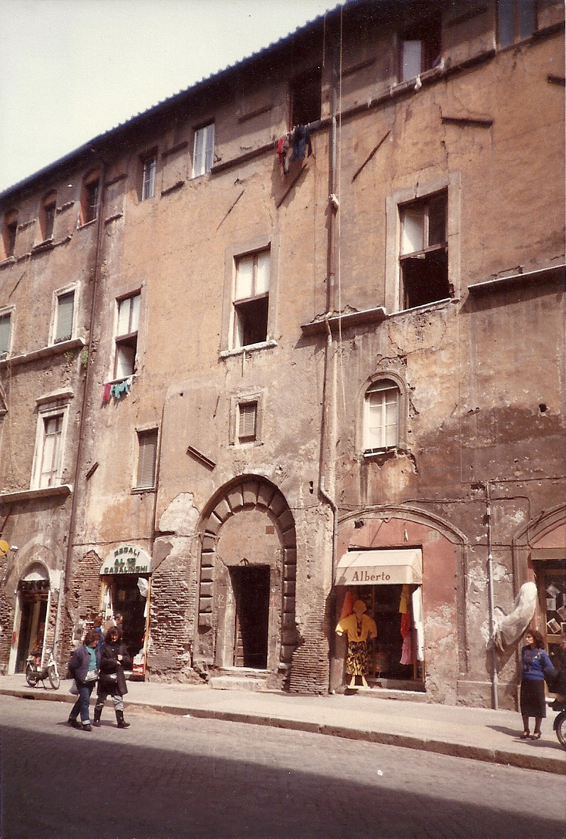 Via del Portico d' Ottavia 13, "Il portonaccio", foto di Matilde Baroni, 1990.